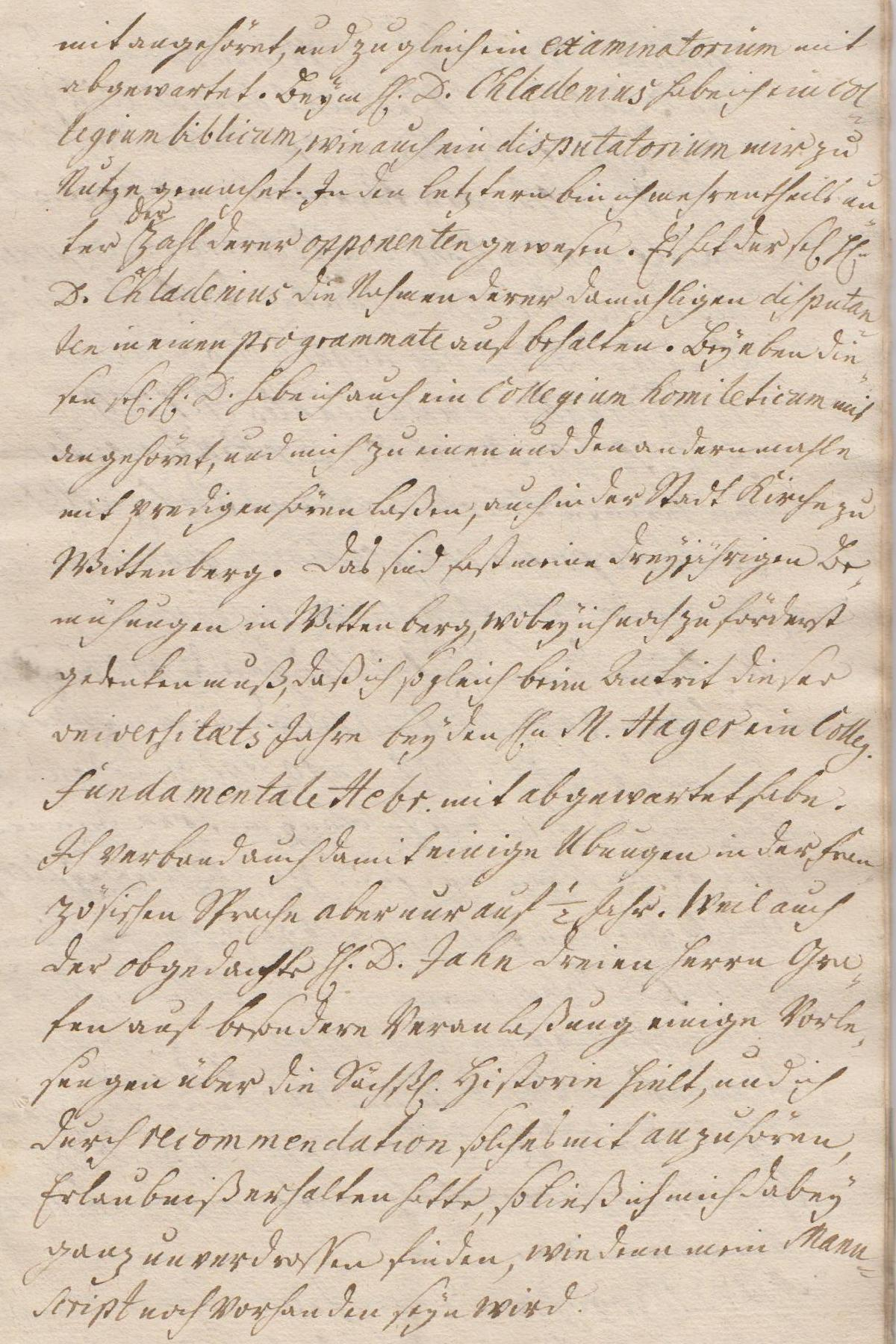 Seite 5 der Leichenpredigt für den Pastor August Wilhelm Reinhart (1696/1770), Bürger der Stadt Heringen an der Helme.